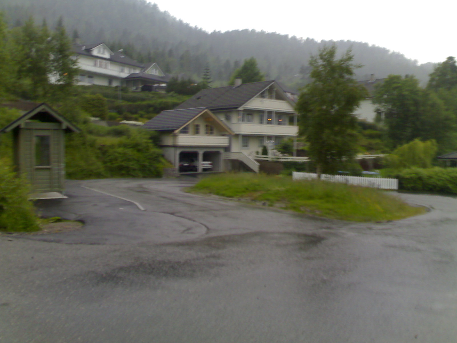 Rundkjøingen i Slåttebakkane.